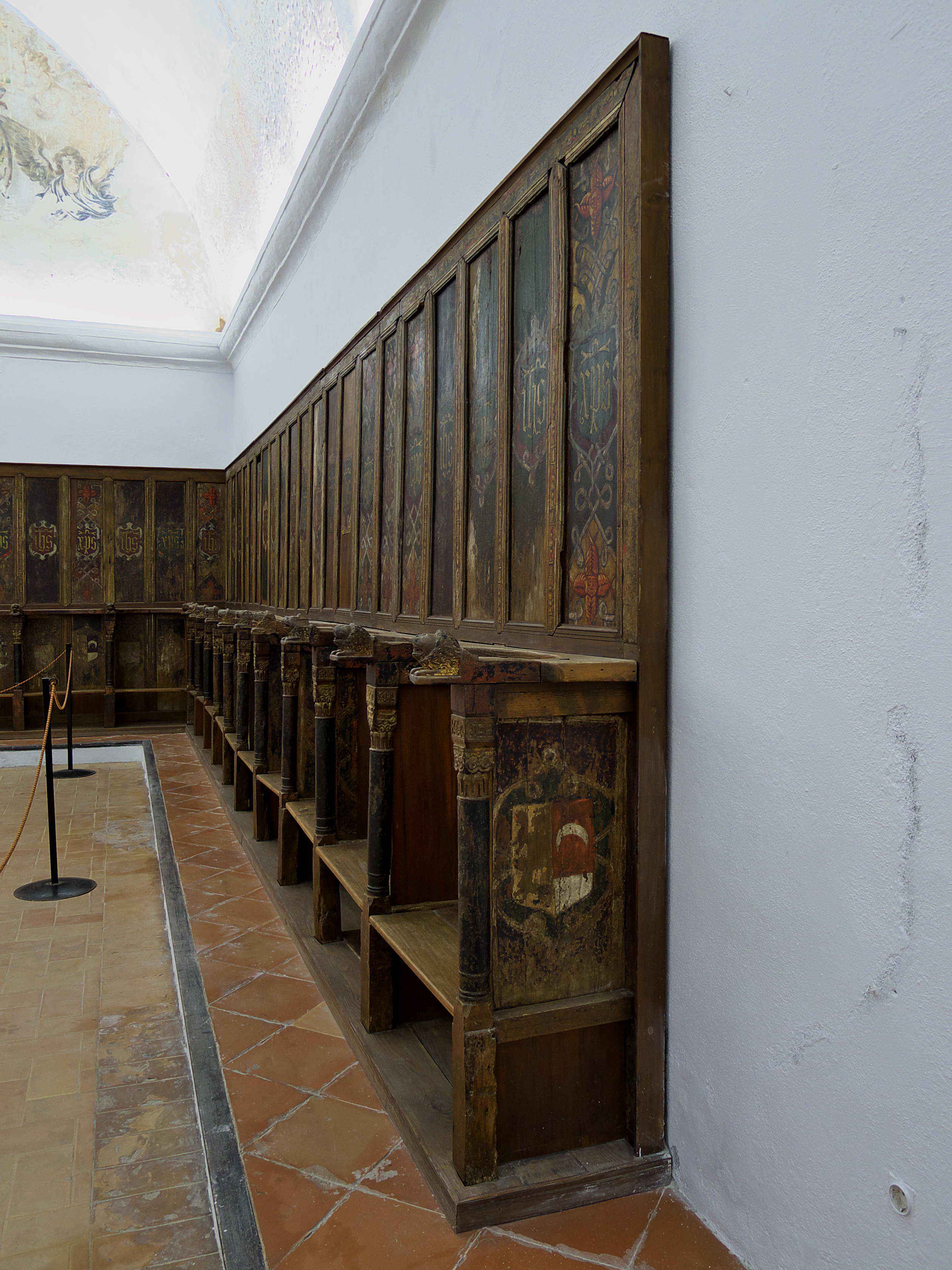 Monasterio de Santa Clara (Moguer). Original obra mudéjar, tercer cuarto del s. XIV Referencia, Sillería de coro mudéjar del Monasterio de Santa María la Real (Gradefes)